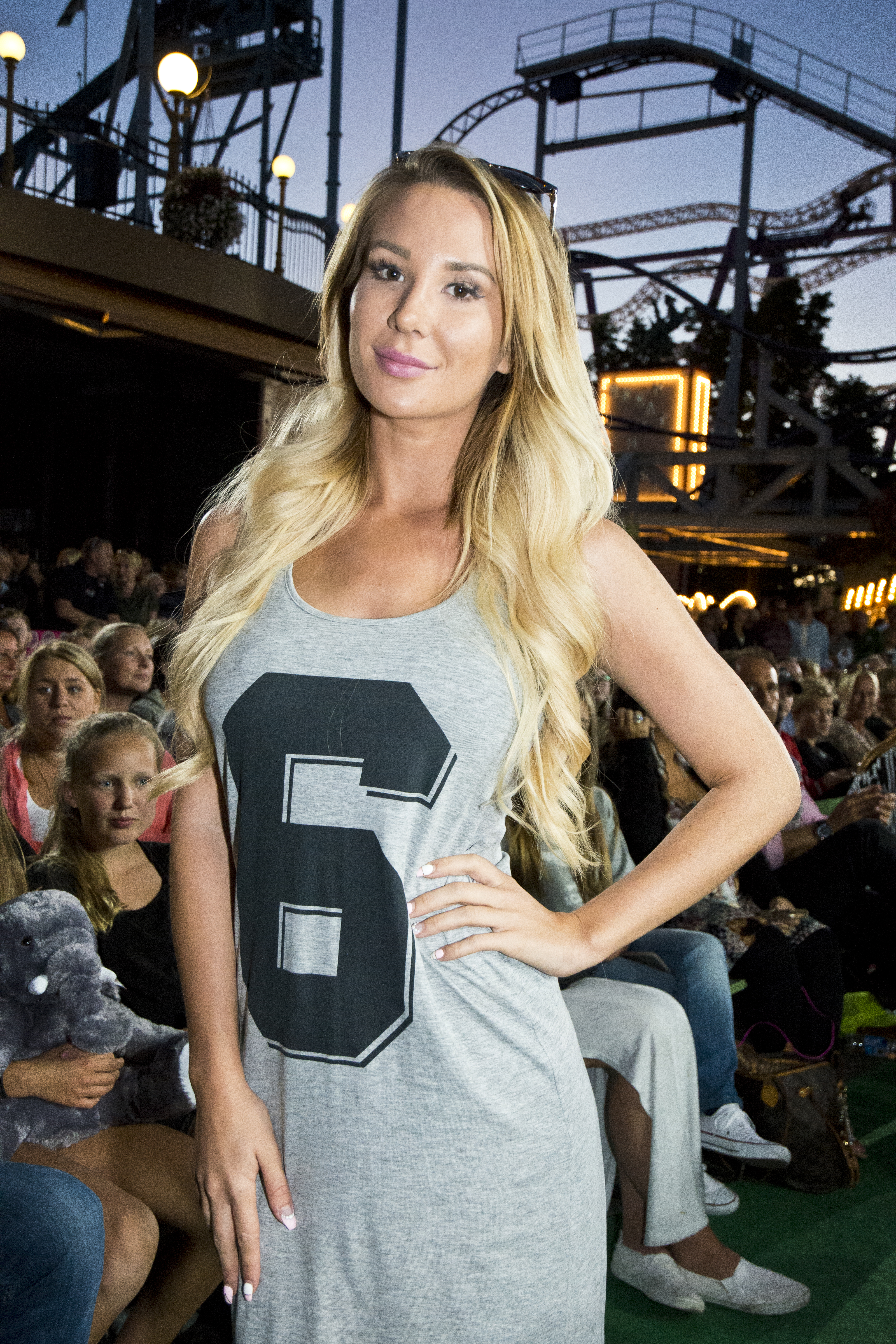 Alexandra Kissie Nilsson på Sommarkrysset 2015